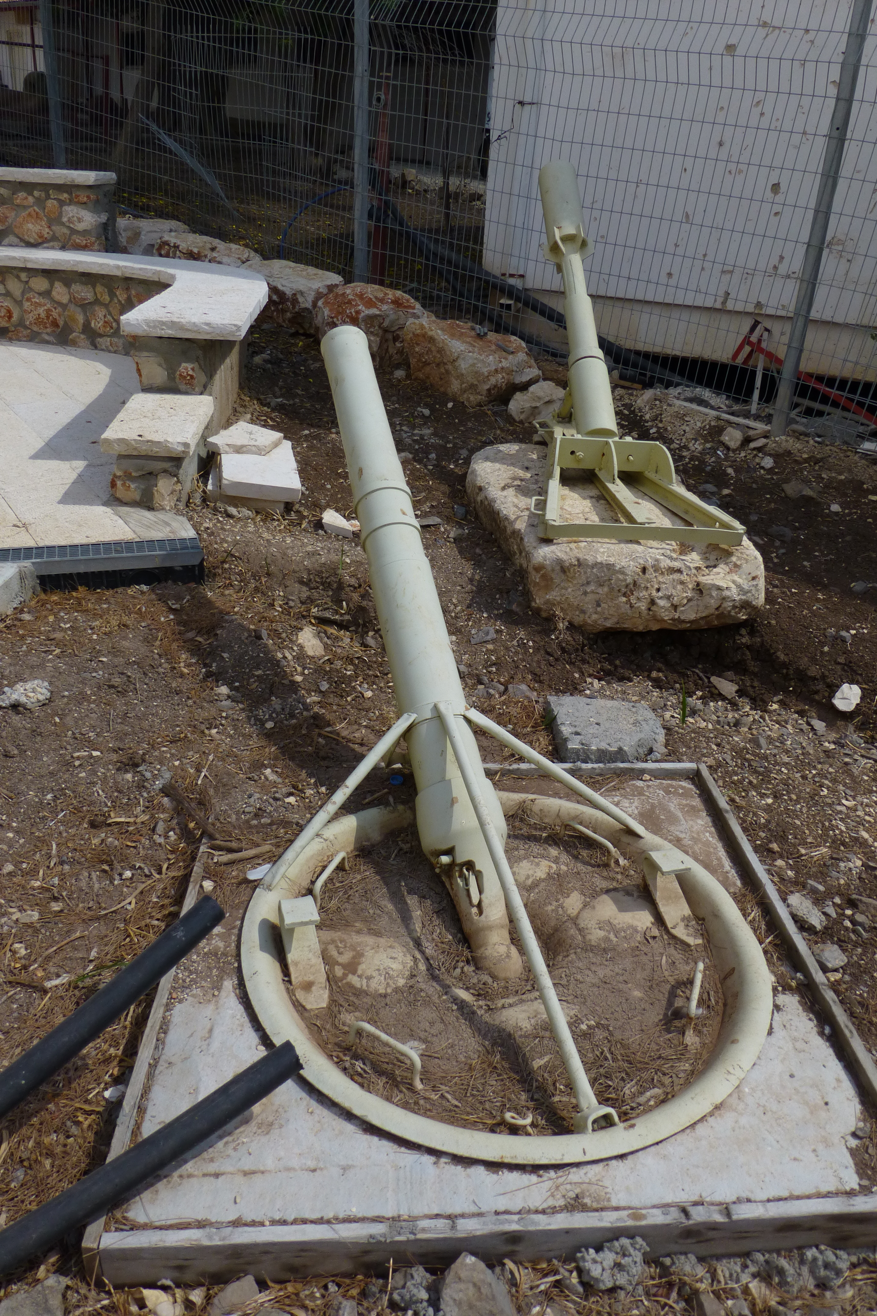 מוזיאון בית שטורמן המצוי בקיבוץ עין חרוד מאוחד נוסד בשנת 1941 על ידי חבר הקיבוץ שמואל סבוראי כמוזיאון לטבע.